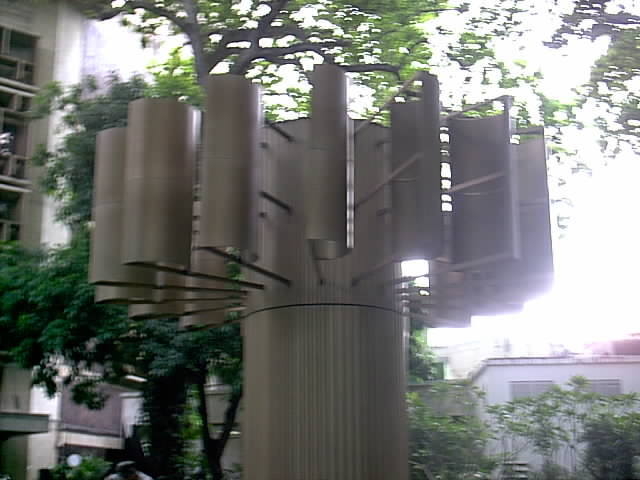 Obra en los jardines del Museo de Bellas Artes/sculpture by Alejandro Otero